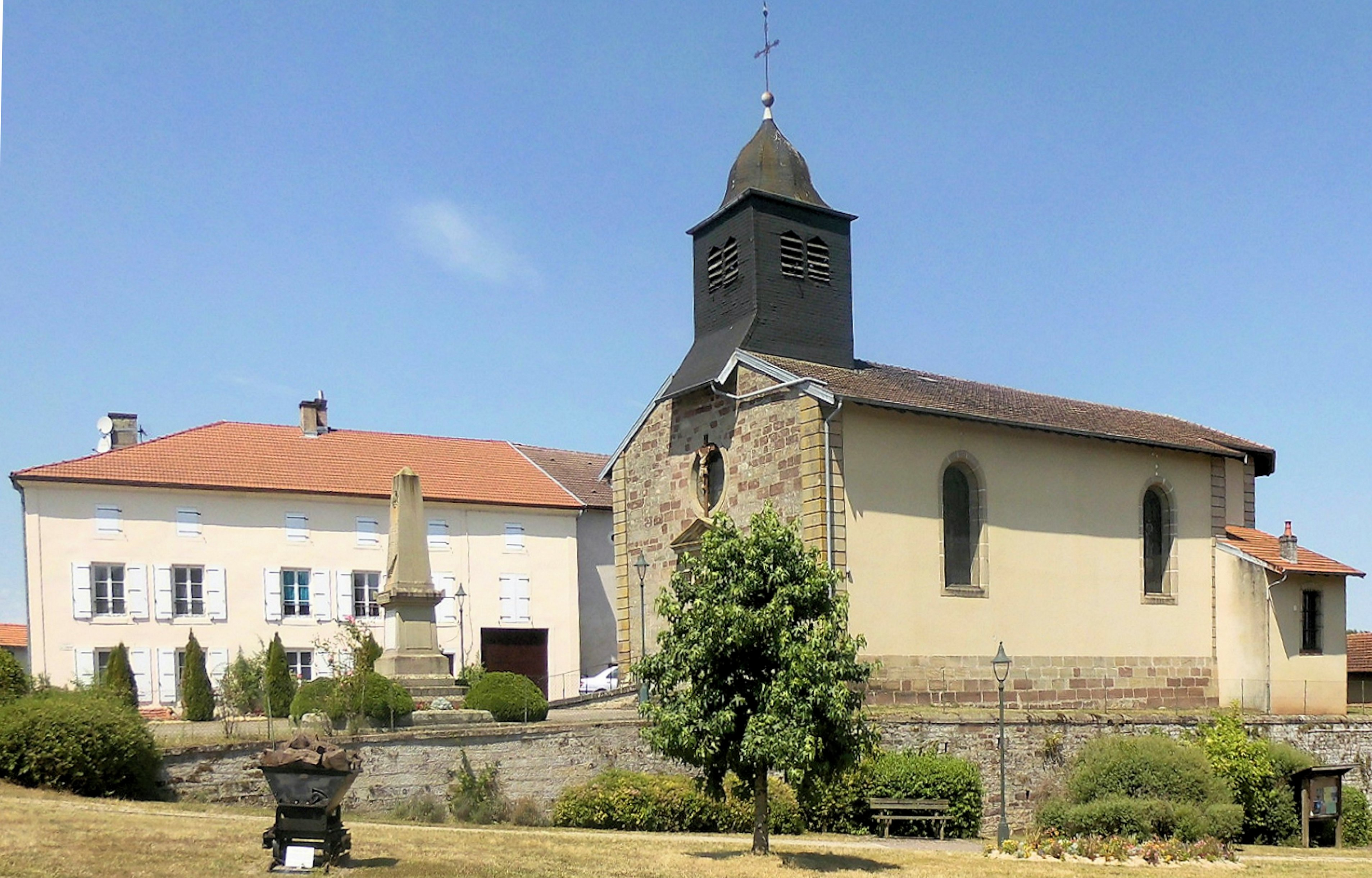 L'église Saint-Epvre à Bonvillet